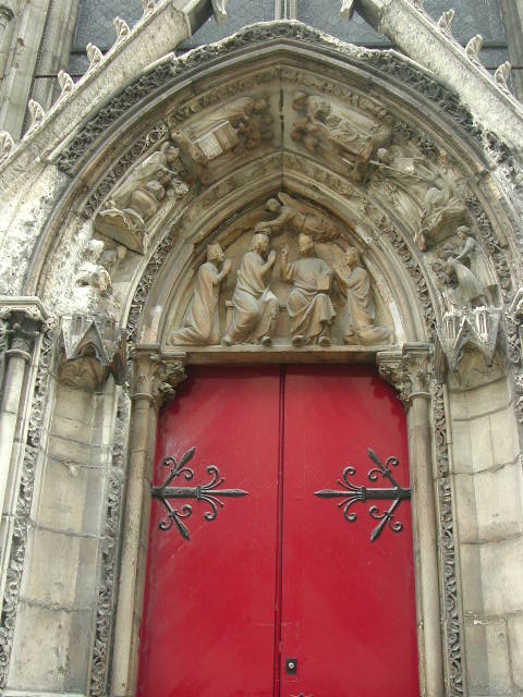 ND Paris : la porte rouge